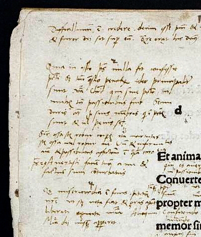 Wolfenbütteler Psalter von 1513 mit handschriftlichen Notizen Martin Luthers. Deutsches UNESCO-Weltdokumentenerbe. Aufbewahrungsort ist die Herzog August Bibliothek in Wolfenbüttel.